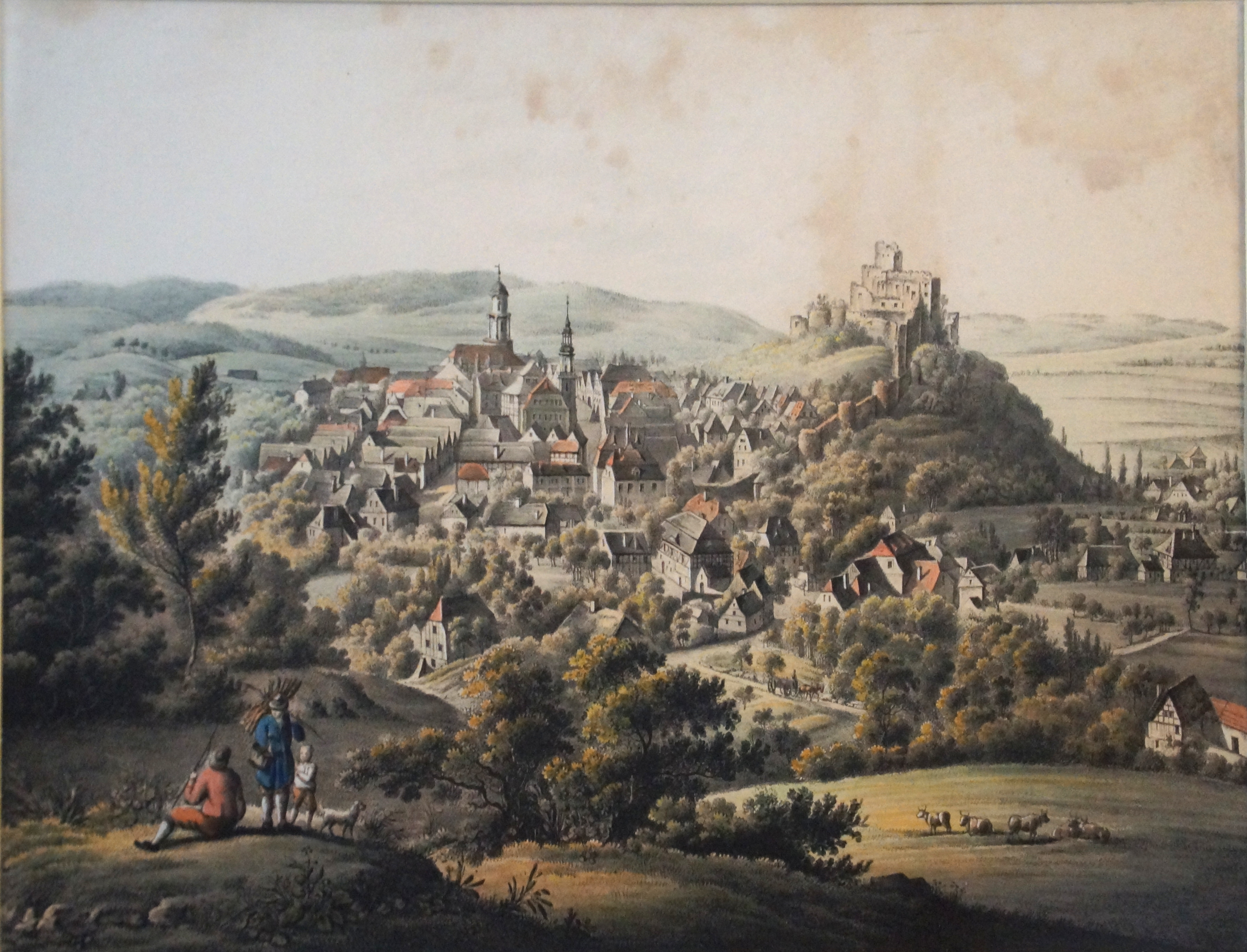 Bolkenhain, kolorierte Lithografie von Carl Theodor Mattis, Schmiedeberg 1837, Sammlung Haselbach